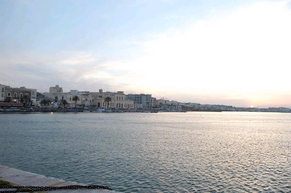 Panorama del porto di Molfetta. Immagine tratta dal sito [ Molfetta.live].